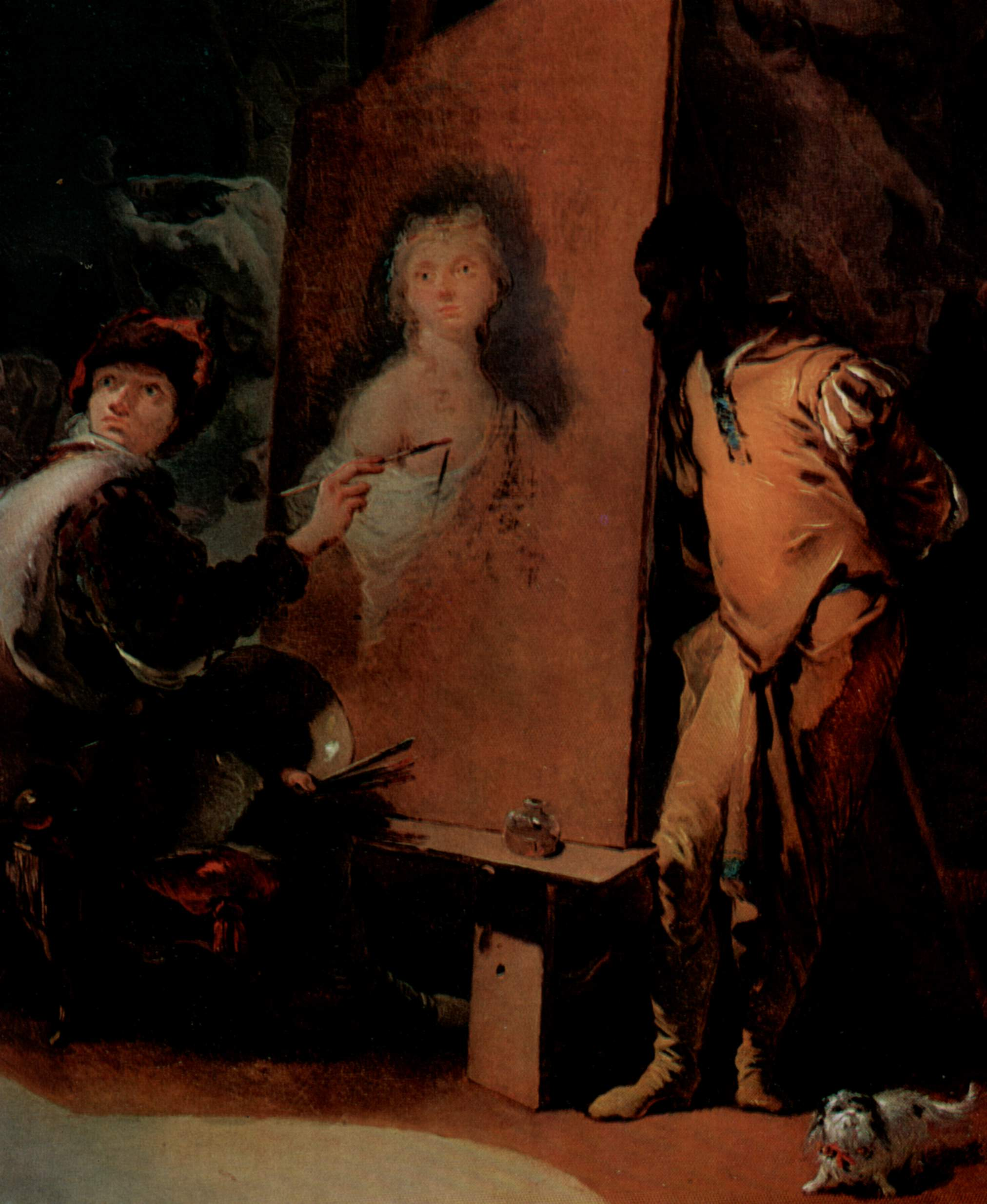 detail